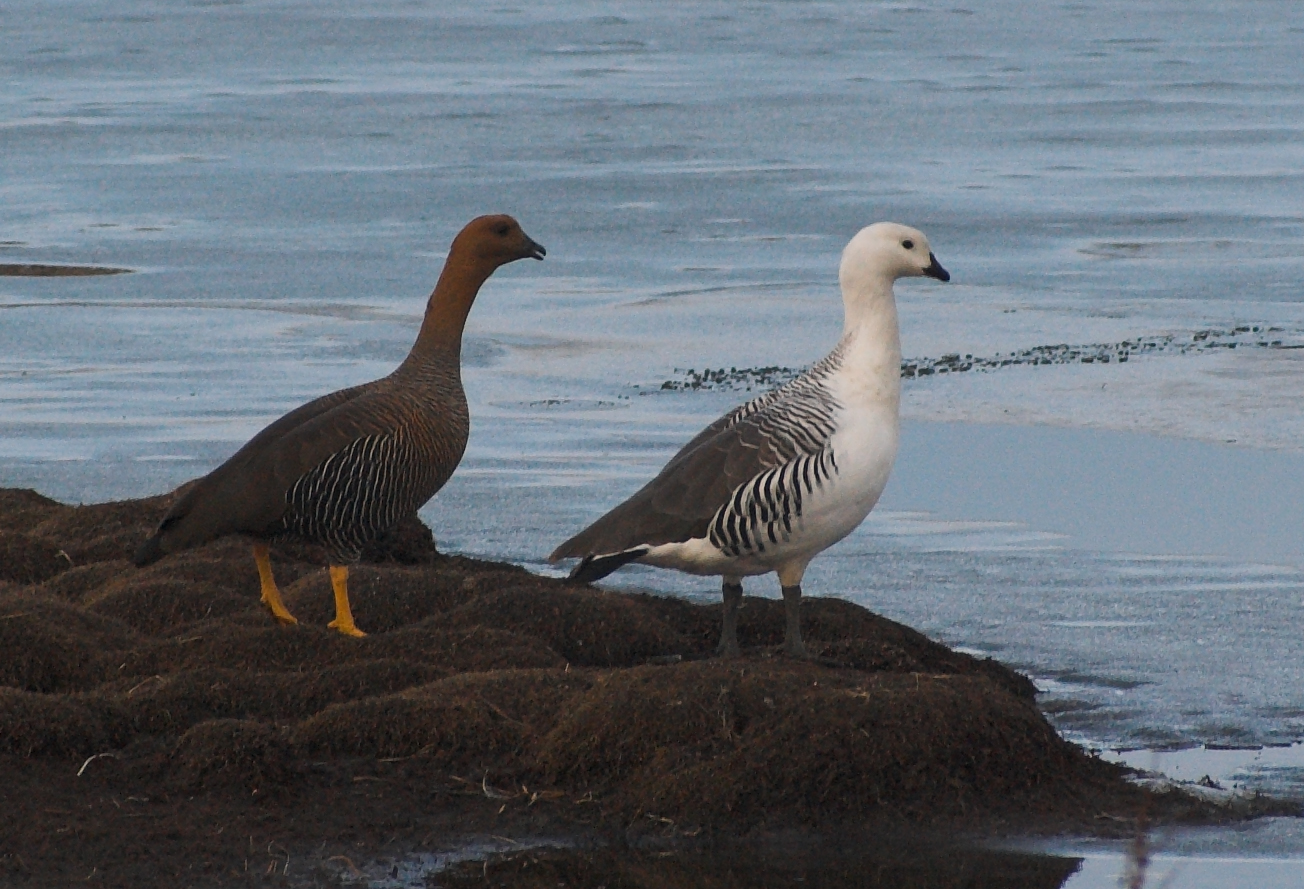 Chloephaga picta (Upland goose - Cauquén Comun), El Calafate, Santa Cruz, Argentina.